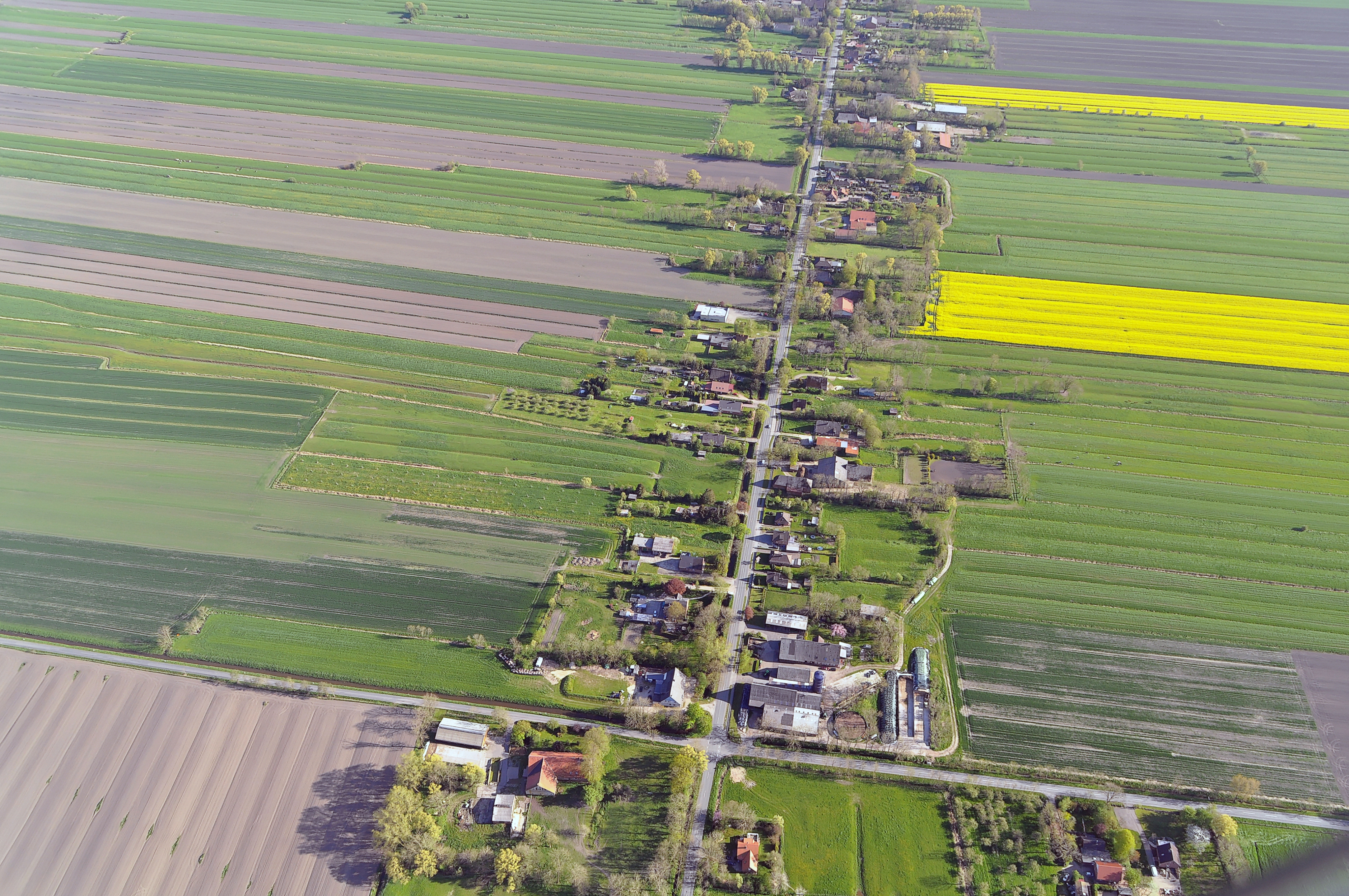 Luftbilder von der Nordseeküste 2012-05